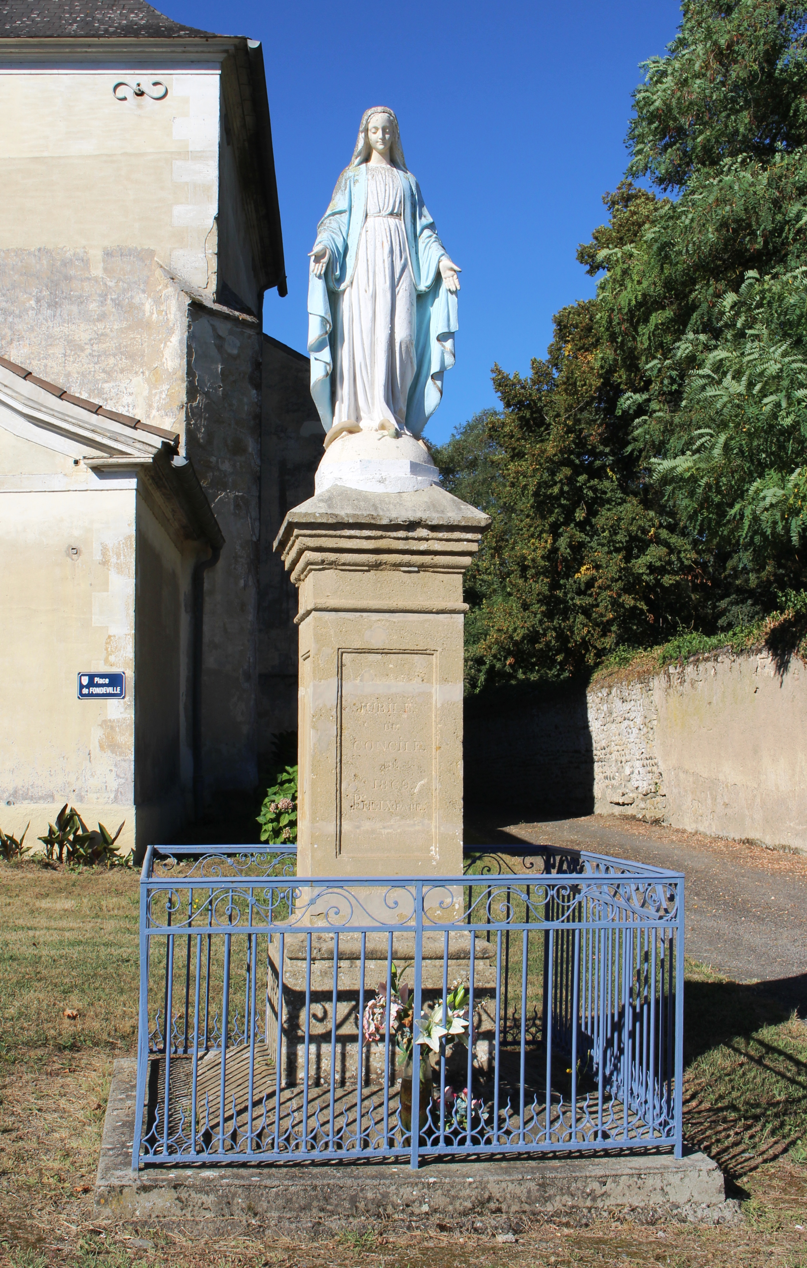 Vierge de Labatut-Rivière (Hautes-Pyrénées)